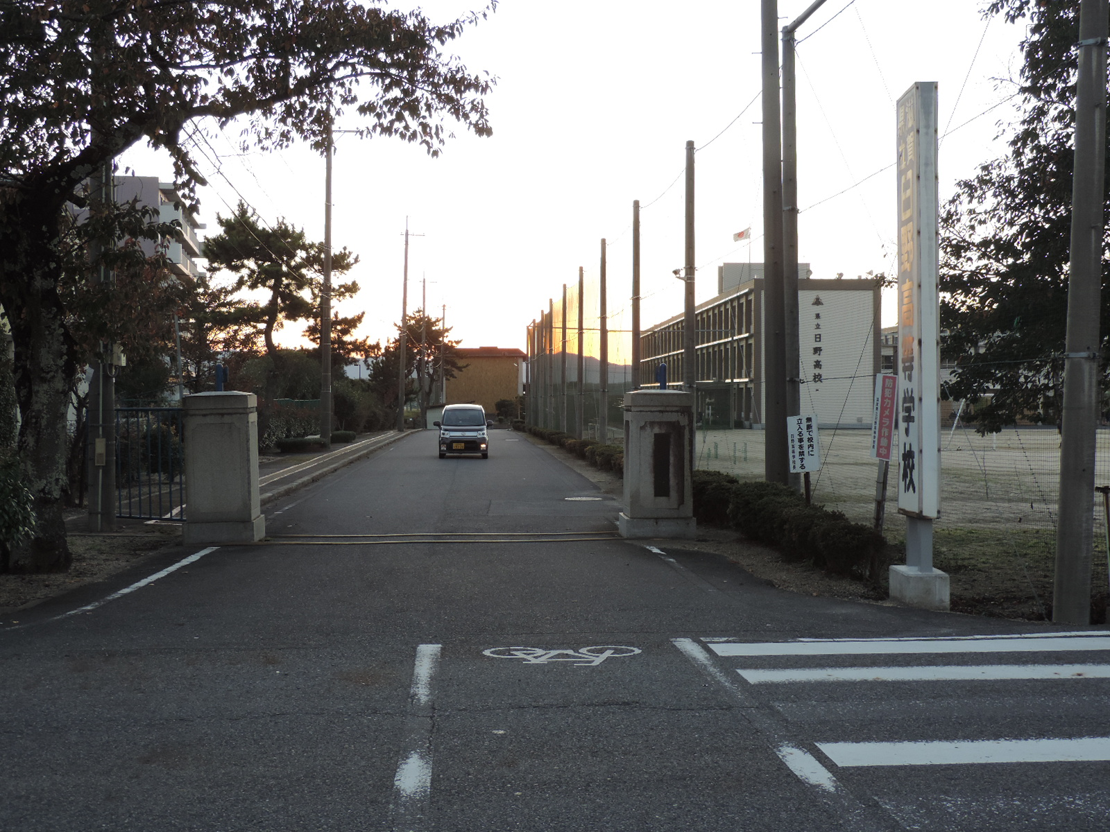 滋賀県立日野高等学校。2017年撮影